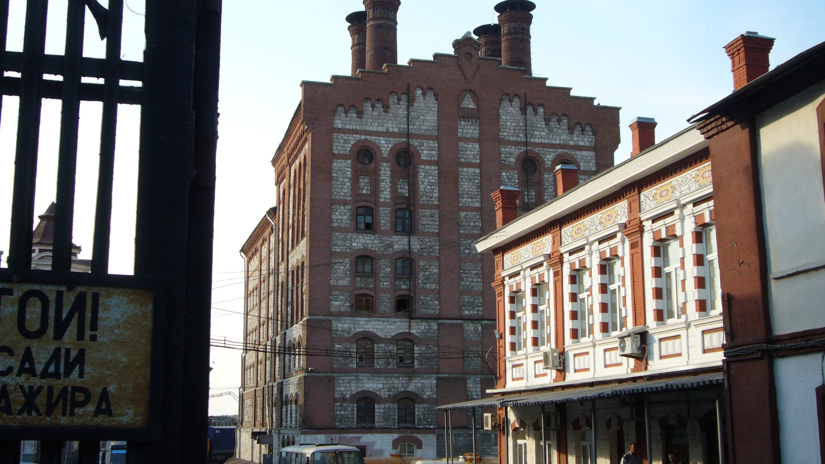 Жигулёвский пивоваренный завод